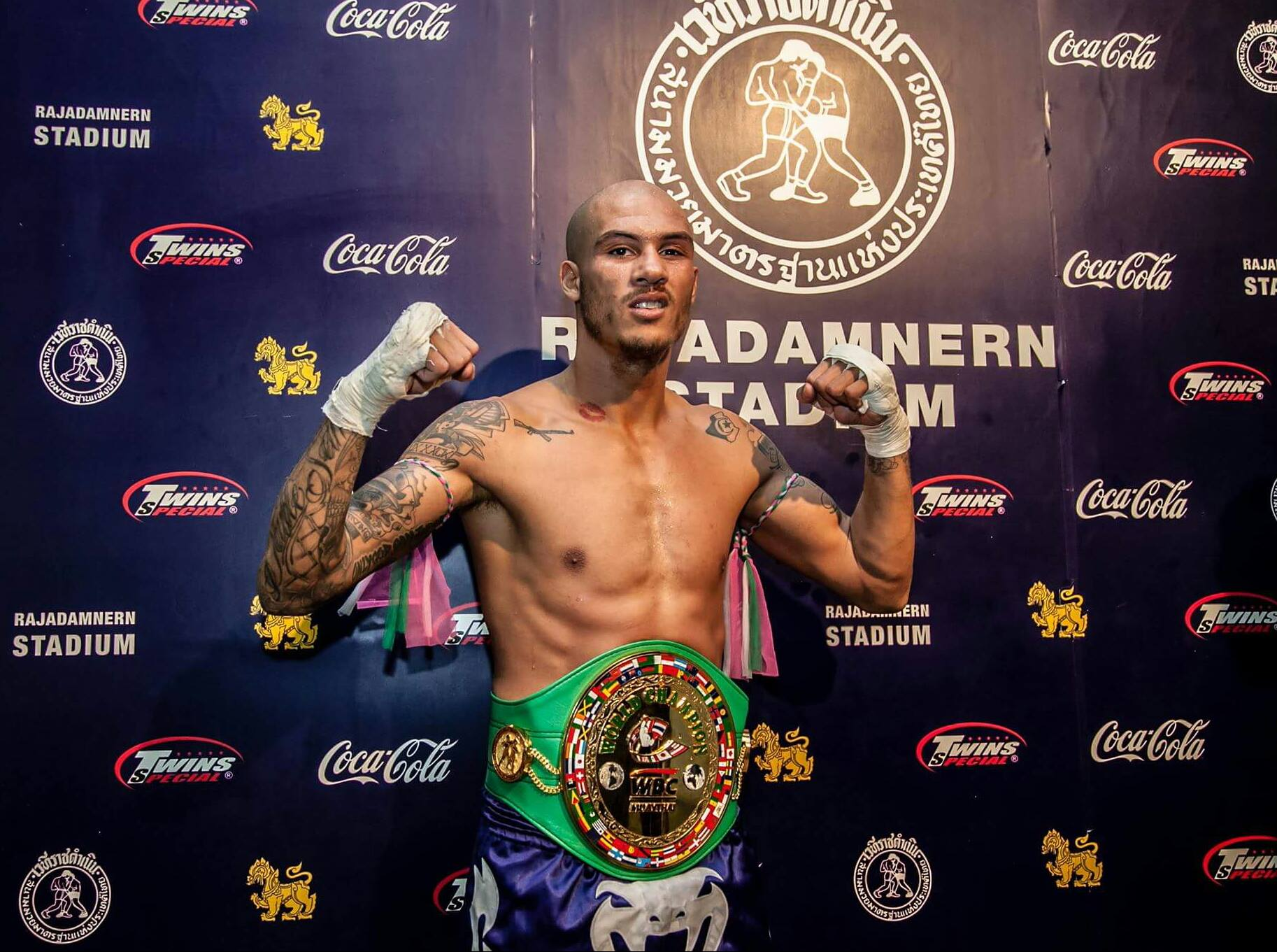 Samy Sana WBC world champion